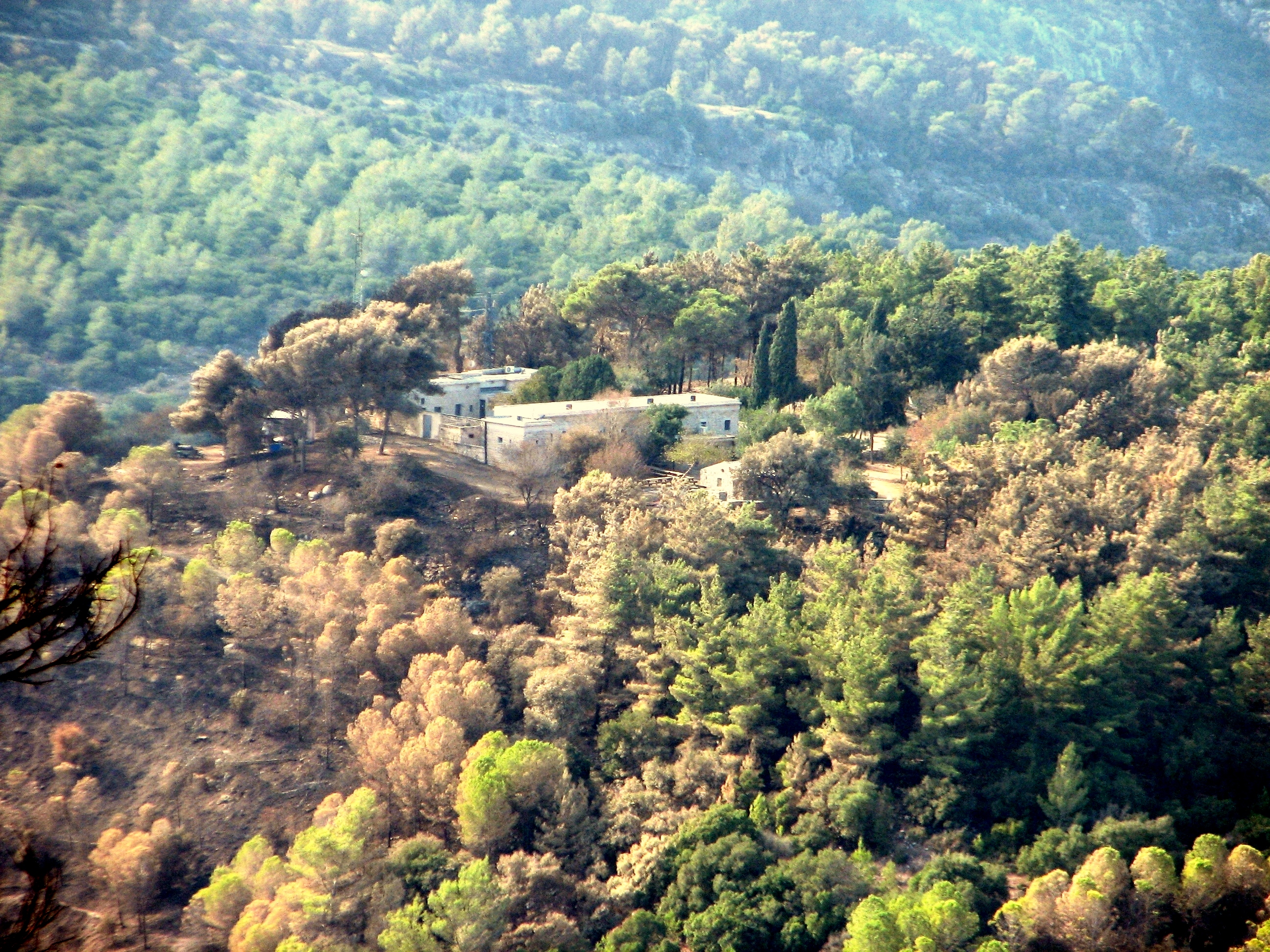 חוות משמר הכרמל או בשמה המקורי "ח'ירבת שלאלה" שוכנת על גבעה מורמת בלב הכרמל. באתר מבנה חאן עתיק. היום משמשת כמרכז לפעילות של רשות הטבע והגנים צולם לאחר תום השריפה בכרמל בחודש דצמבר 2010